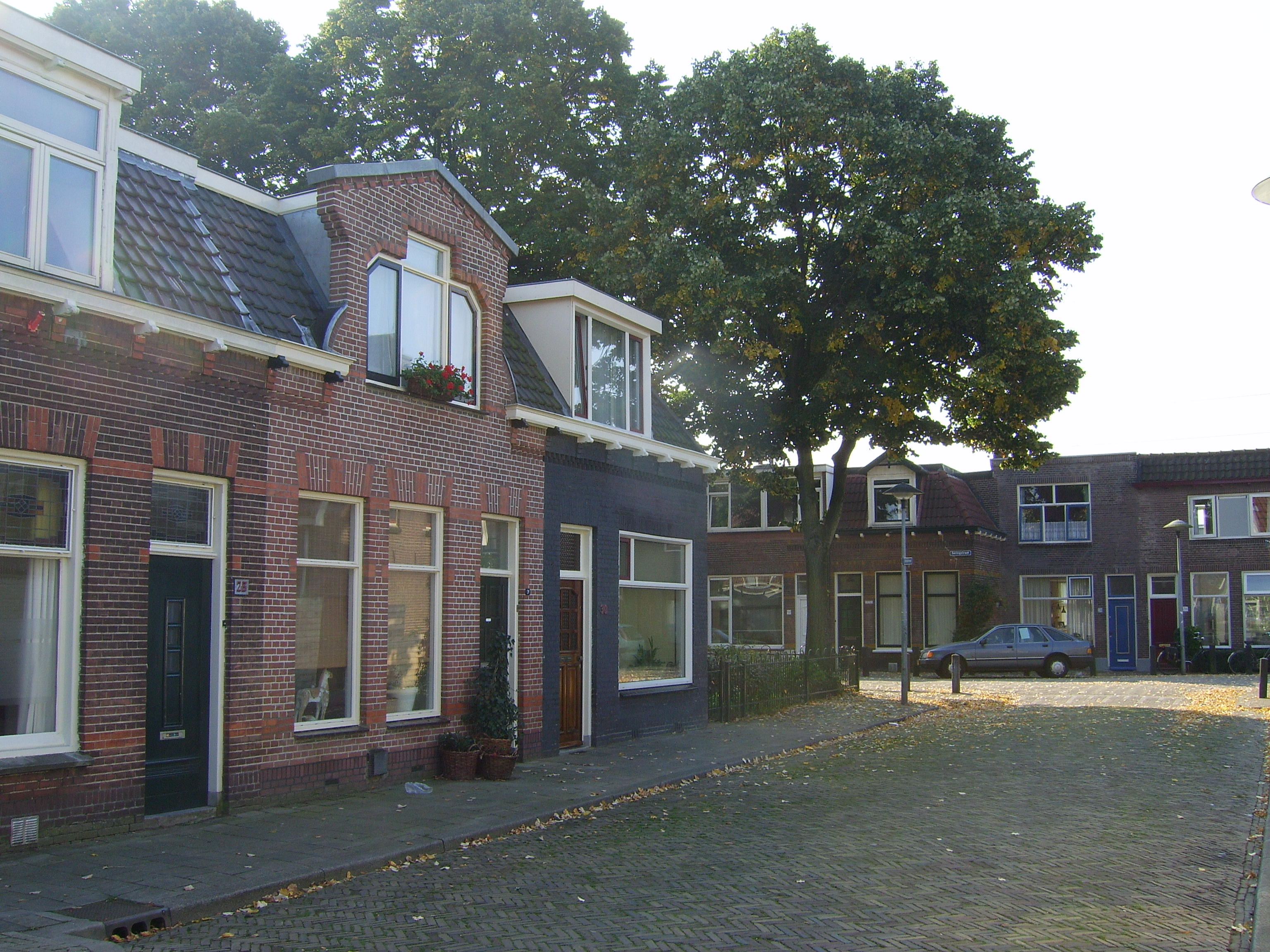 Utrecht: Zicht op Seringstraat vanaf Distelstraat, ongeveer 400 meter ten westen van Ondiep. Eigen werk Ruben Alexander